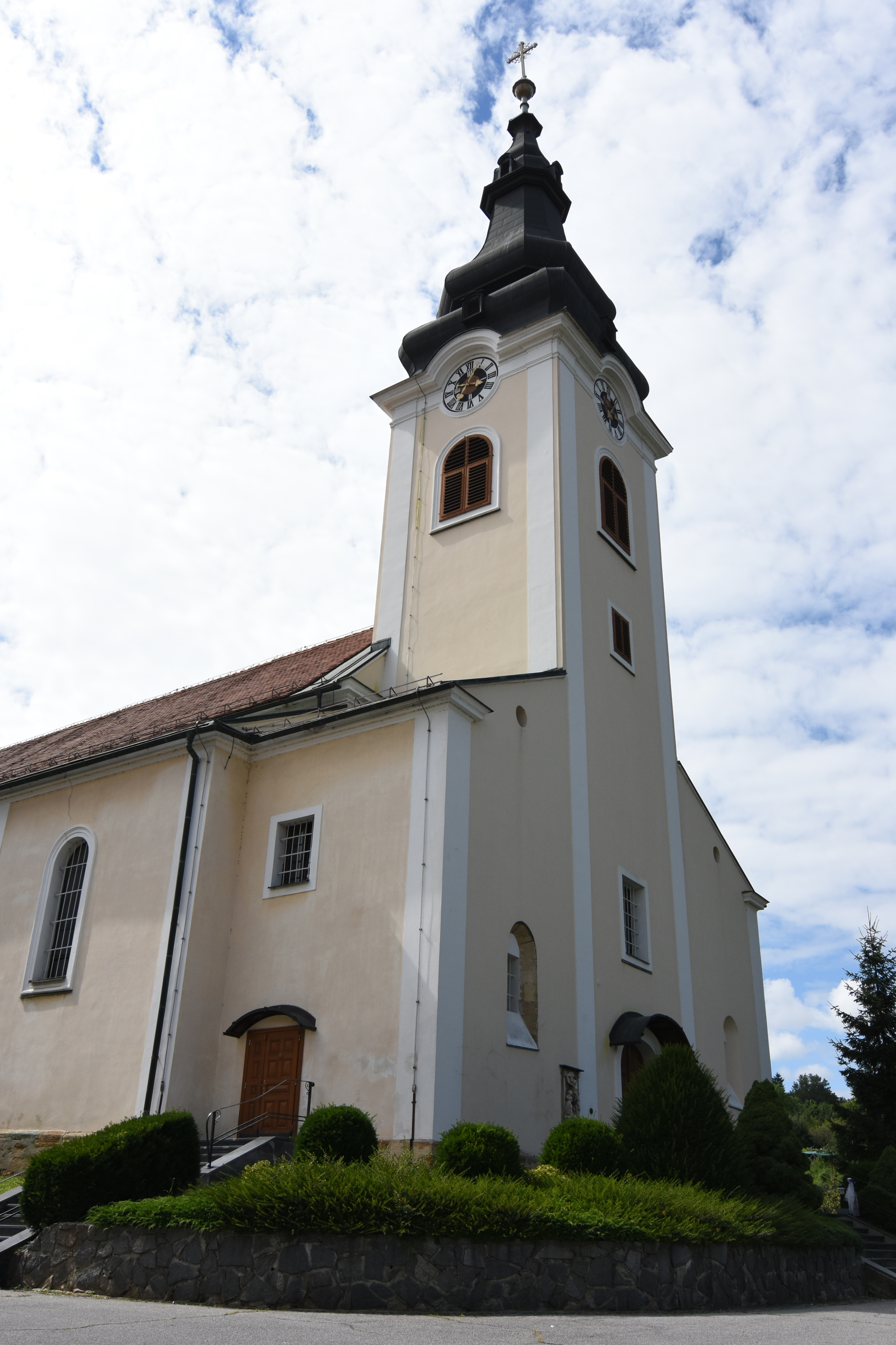 St. Peter's Parish Church Gornja Radgona